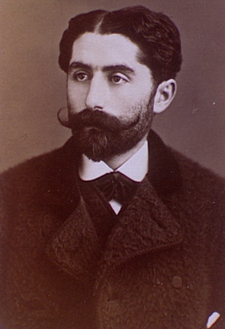 Paschal Grousset (1844-1909)